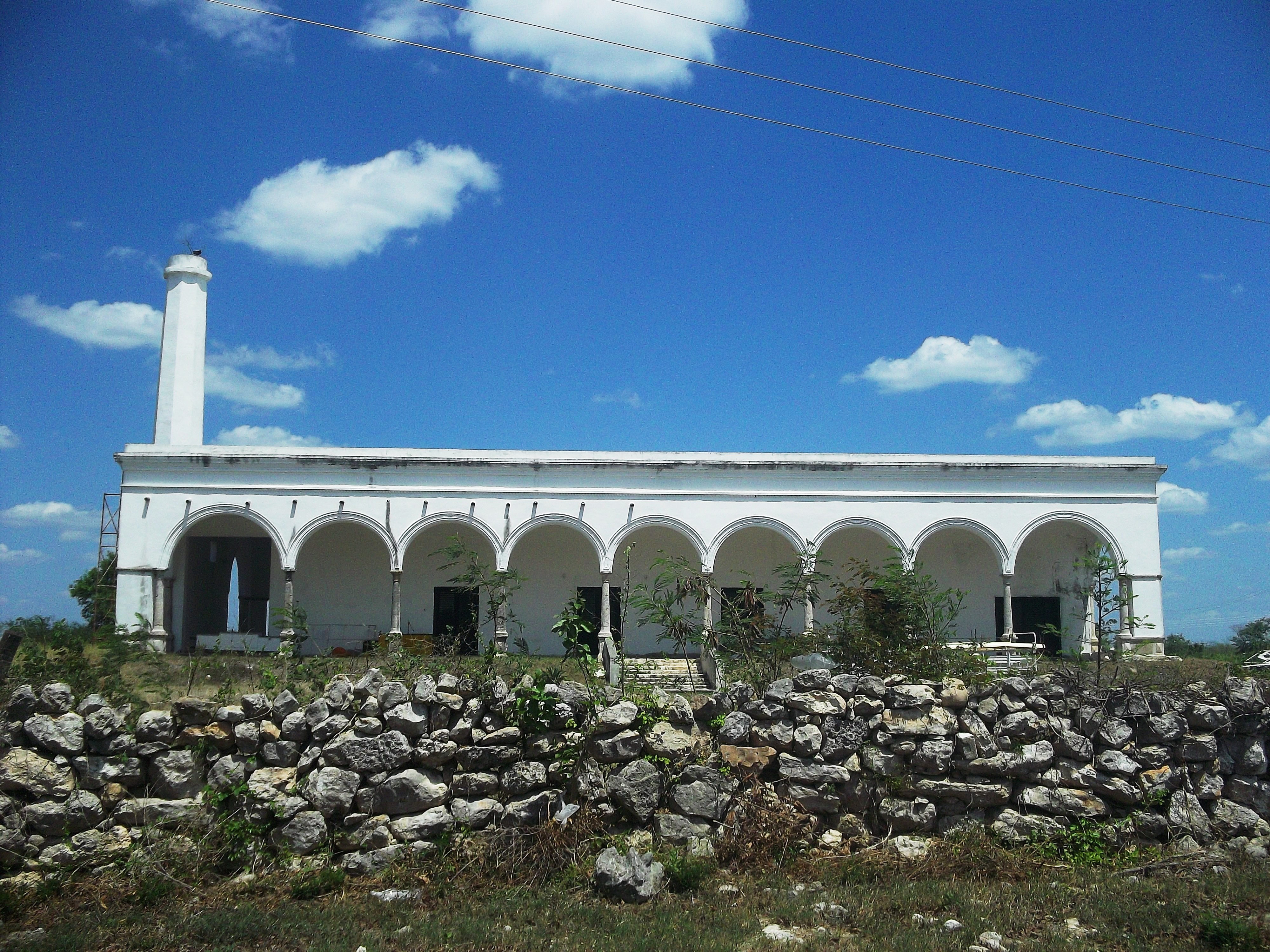 Hacienda de Oncán, Yucatán.